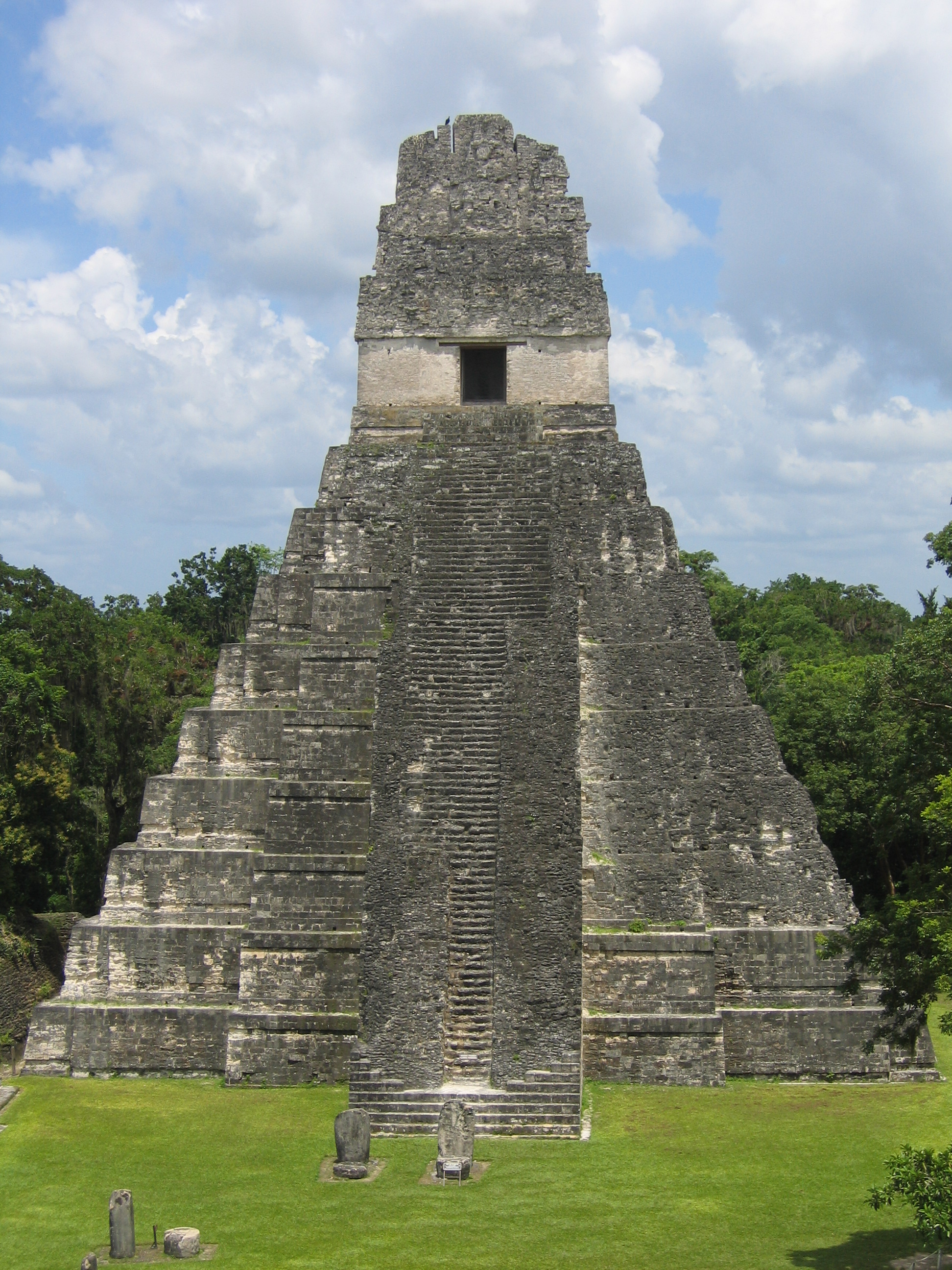 Tikal (Guatemala), temple 1, August 2006